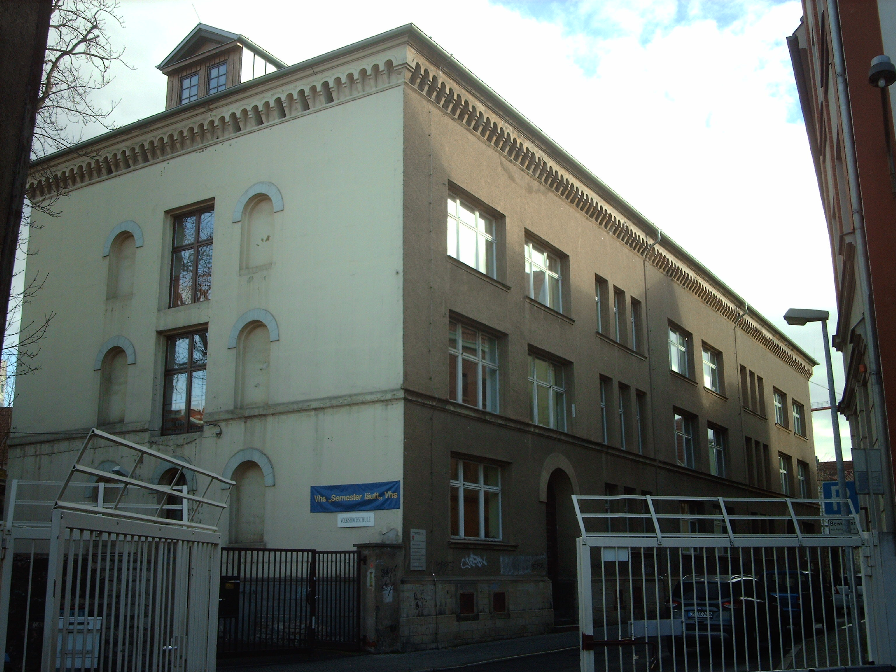 Volkshochschule in Erfurt, Schottenstraße 7.